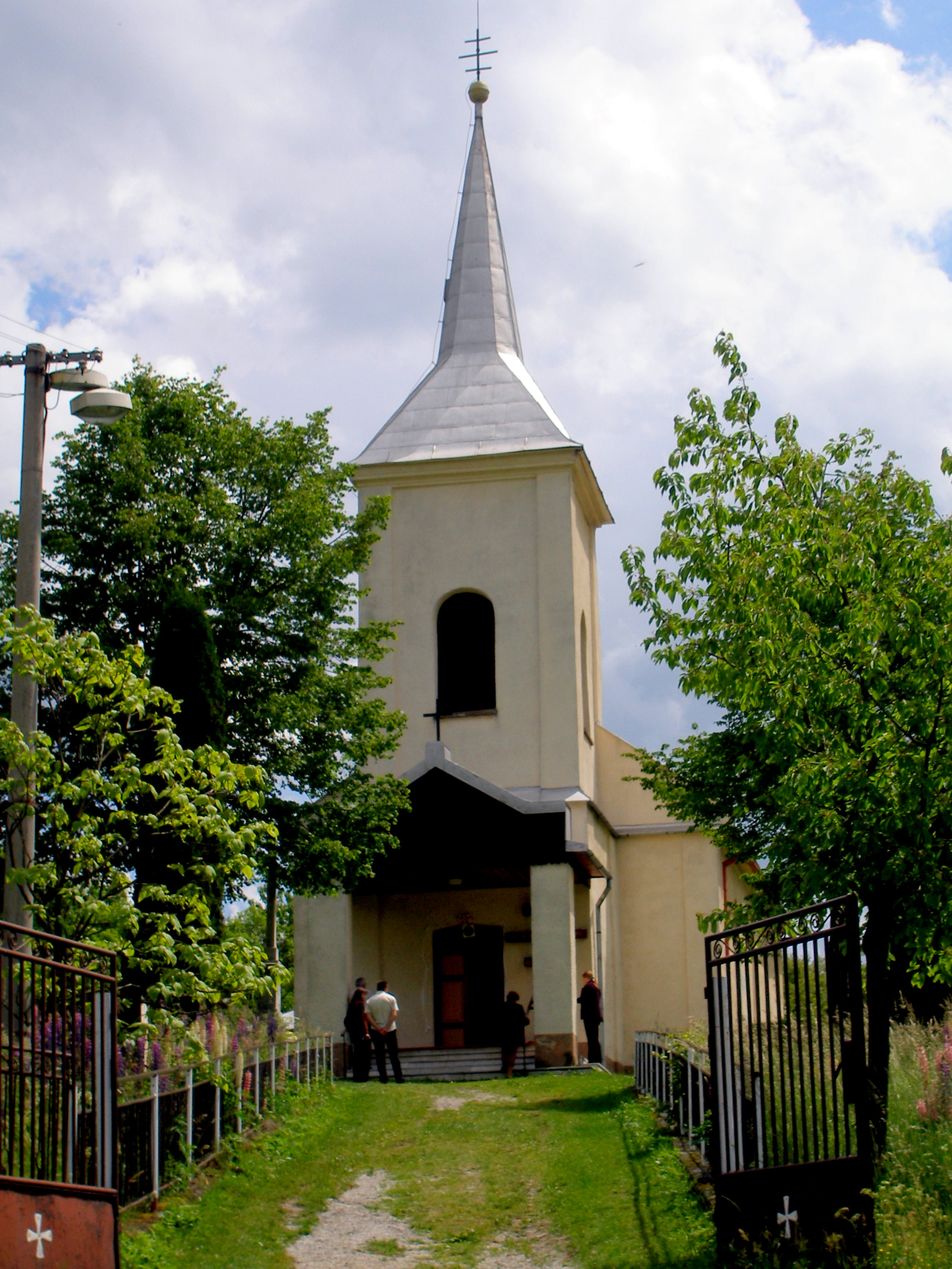 Obec Jakovany okres Sabinov.